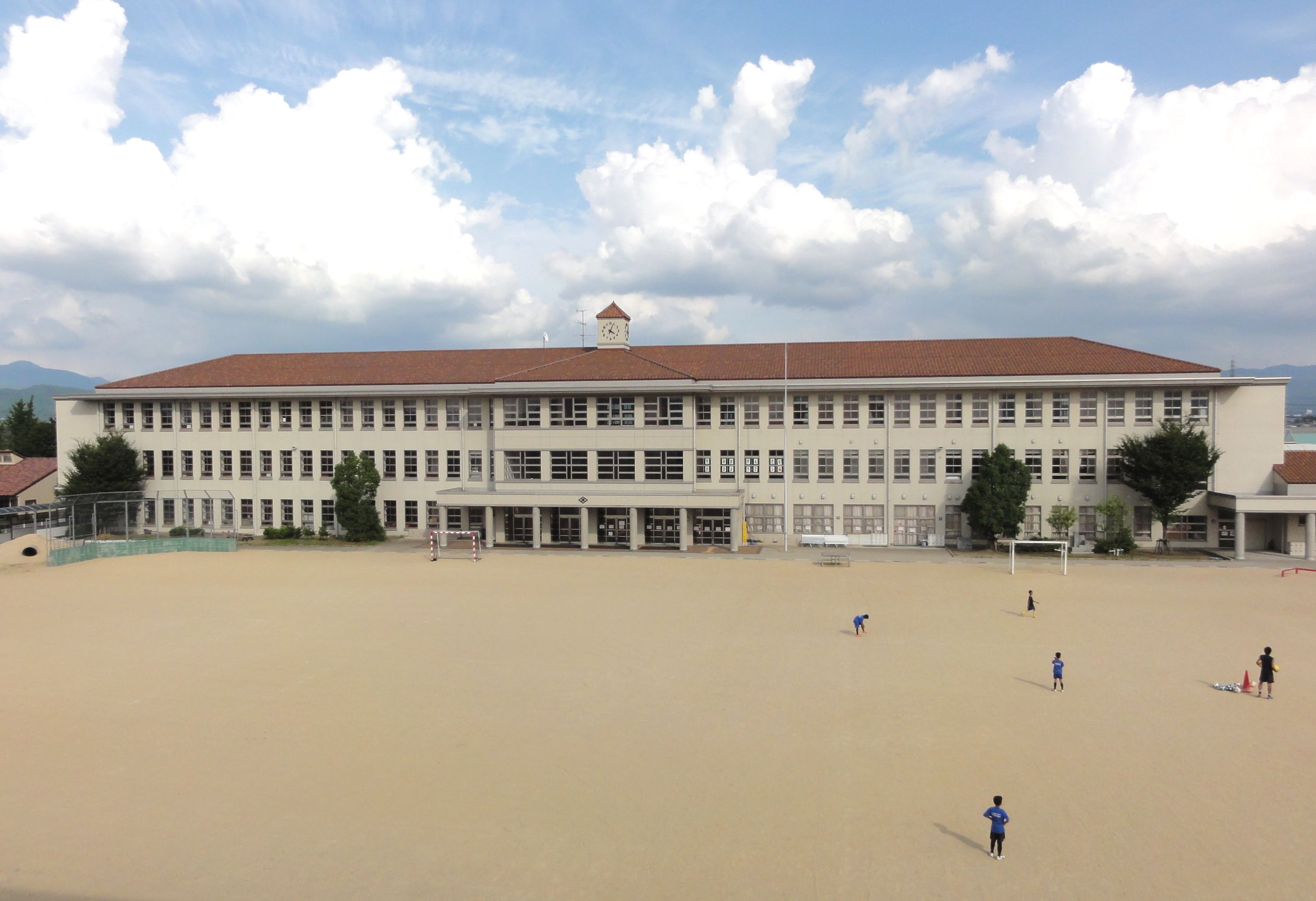 豊郷町立豊郷小学校 旧校舎3F・唱歌室から撮影。